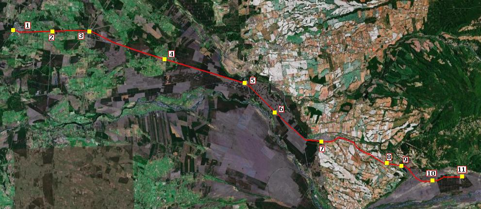 Esquema del Ramal Monte Águila-Polcura